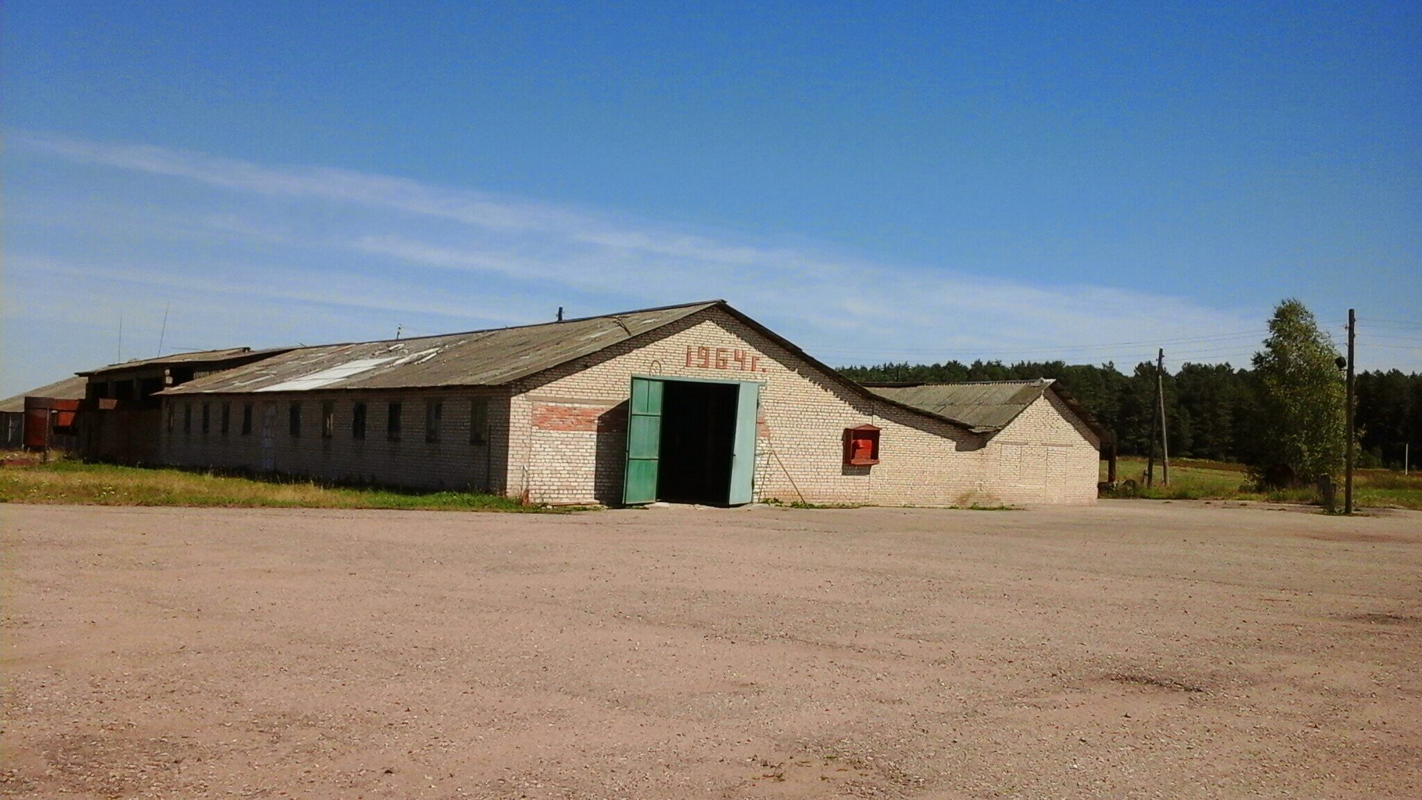 Зерносклад в Скипоровичах